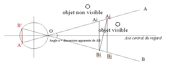 perspective visuelle-graphe explicatif 2 par lyonart